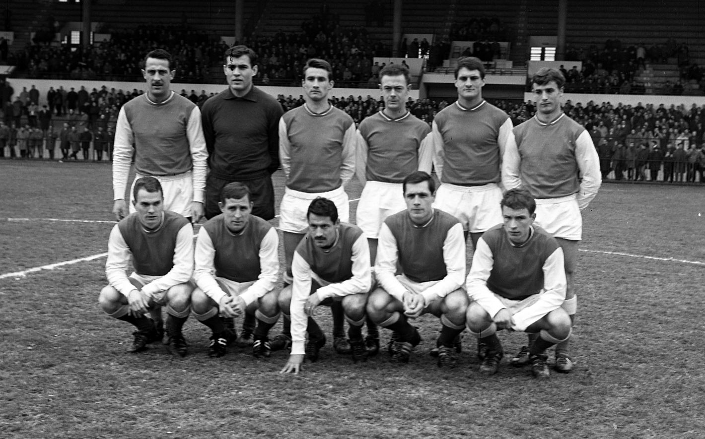 Stadium municipal de Toulouse, 1bis allées Gabriel-Biénès. 13 février 1965. Photo de groupe de l'équipe de football de Reims ; en arrière-plan gradins avec spectateurs. Cliché pris certainement lors d'une rencontre TFC-Reims.